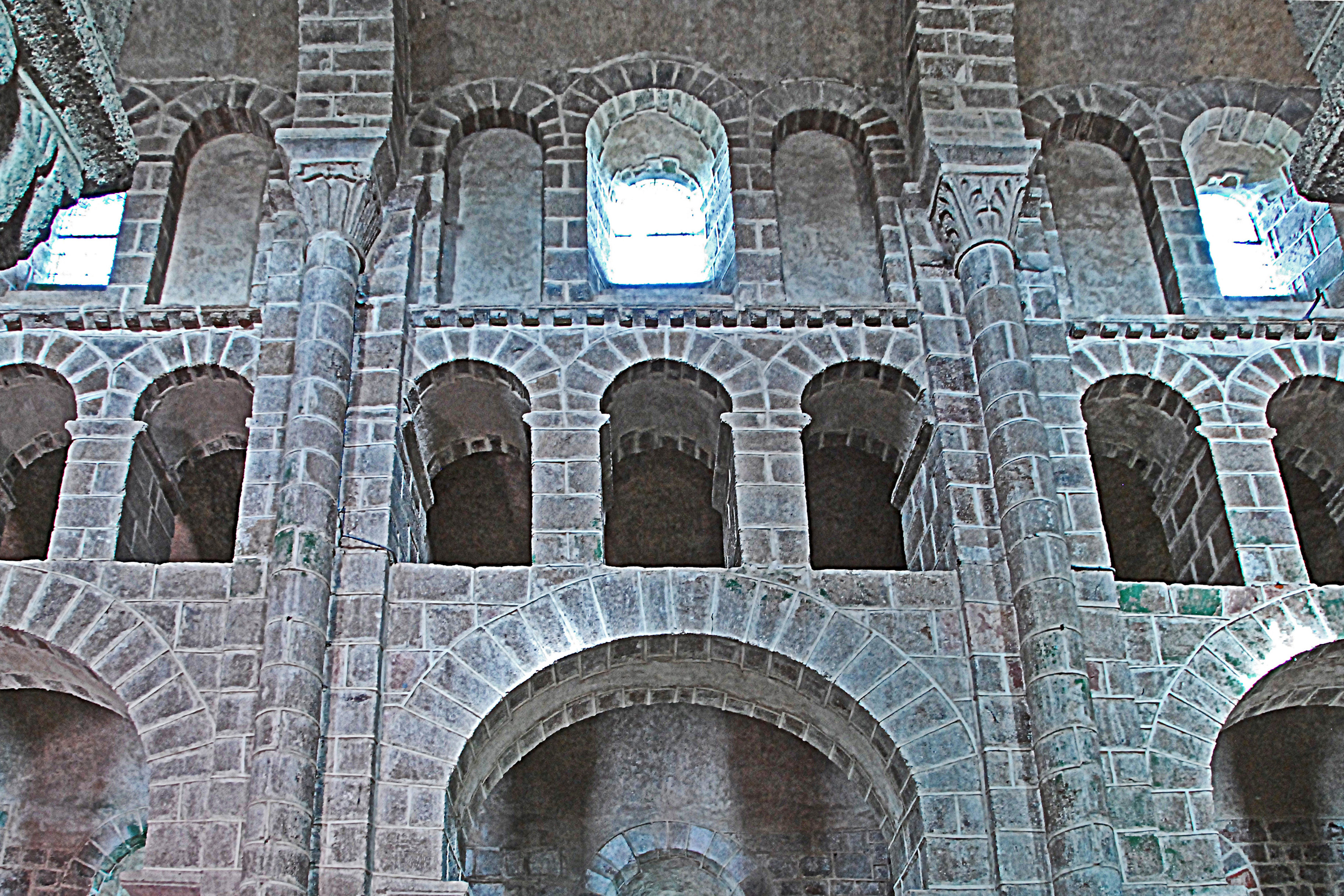 N.-D. de Châtel-Montagne, Mittelschiff, Südwand, Scheintribüne u. Obergaden